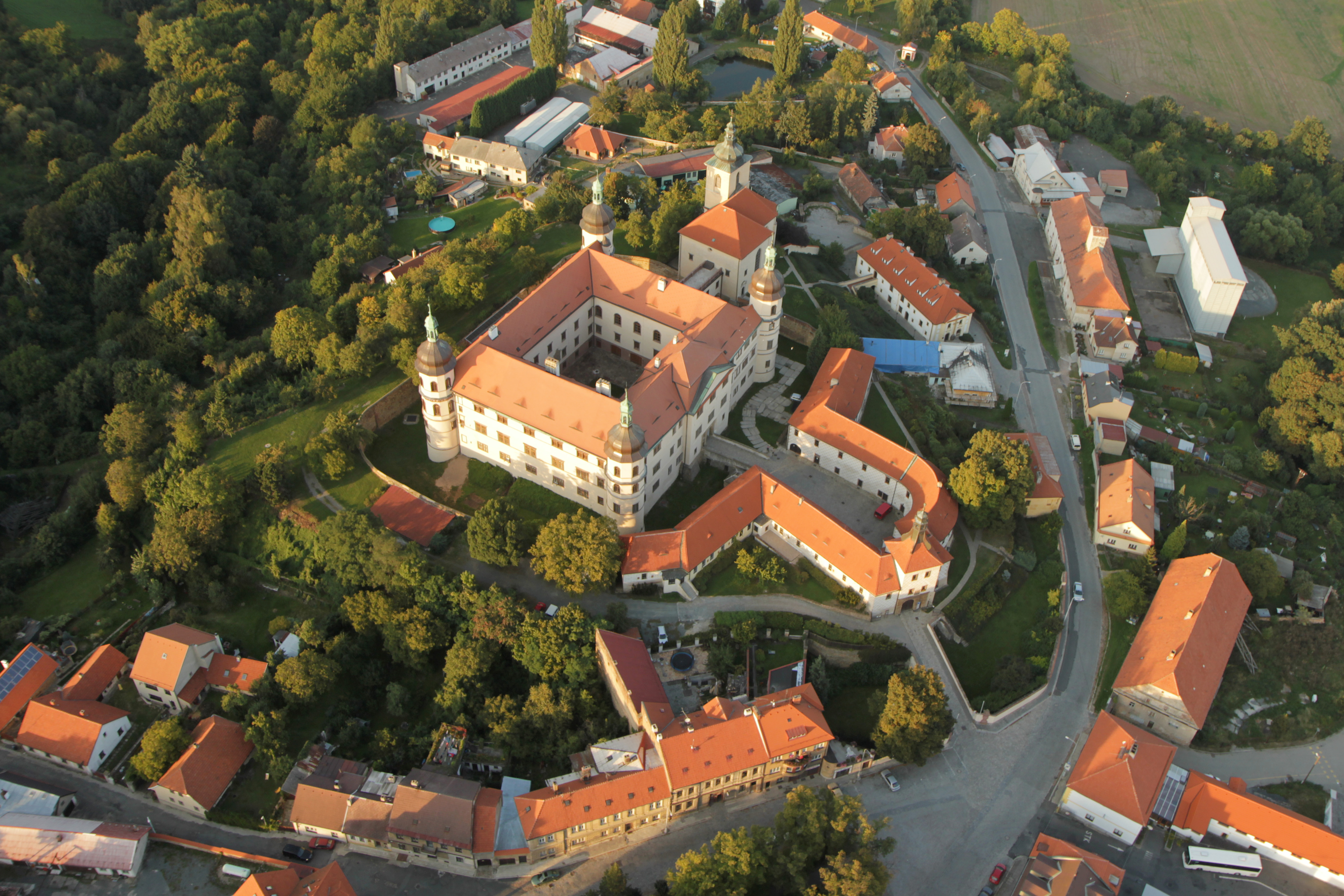 Zámek Kostelec nad Černými lesy, nám. Smiřických 1, Kostelec nad Černými lesy